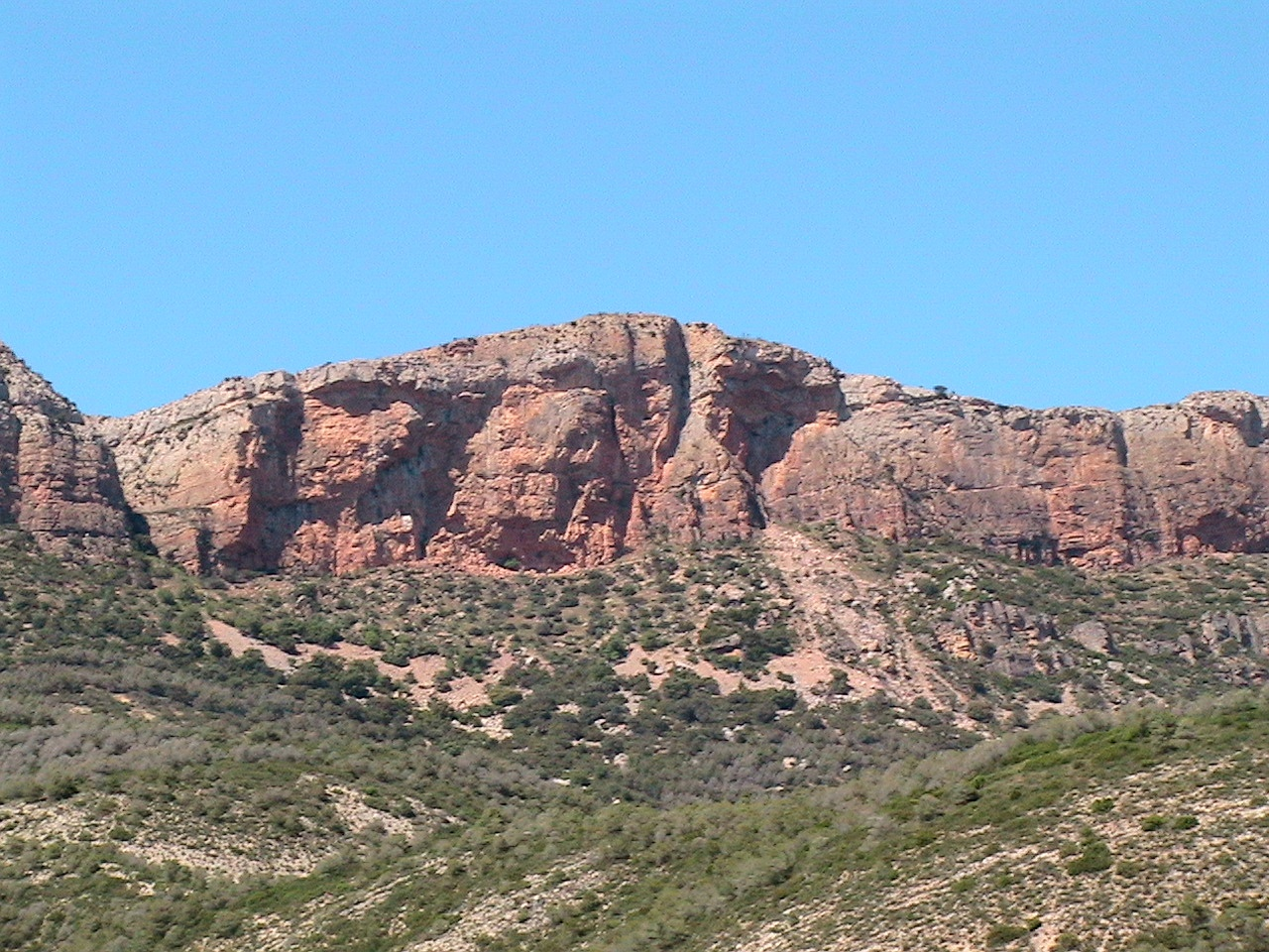 Vista frontal de la paret de la Pala Alta, al Mont-roig, des de Clot de Roure, a Camarasa (Noguera - Catalunya)